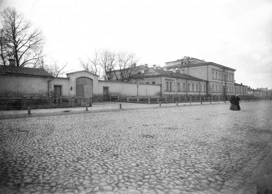 Анатомічний театр Київського університету Св. Володимира авторства Вікентія Беретті